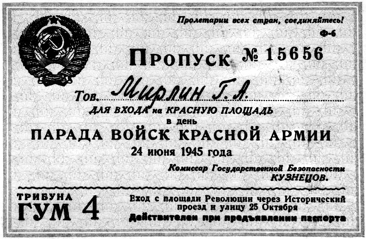 Пропуск на парад 24 июня 1945 года. Выдан Мирлину Гилелю Авсеевичу